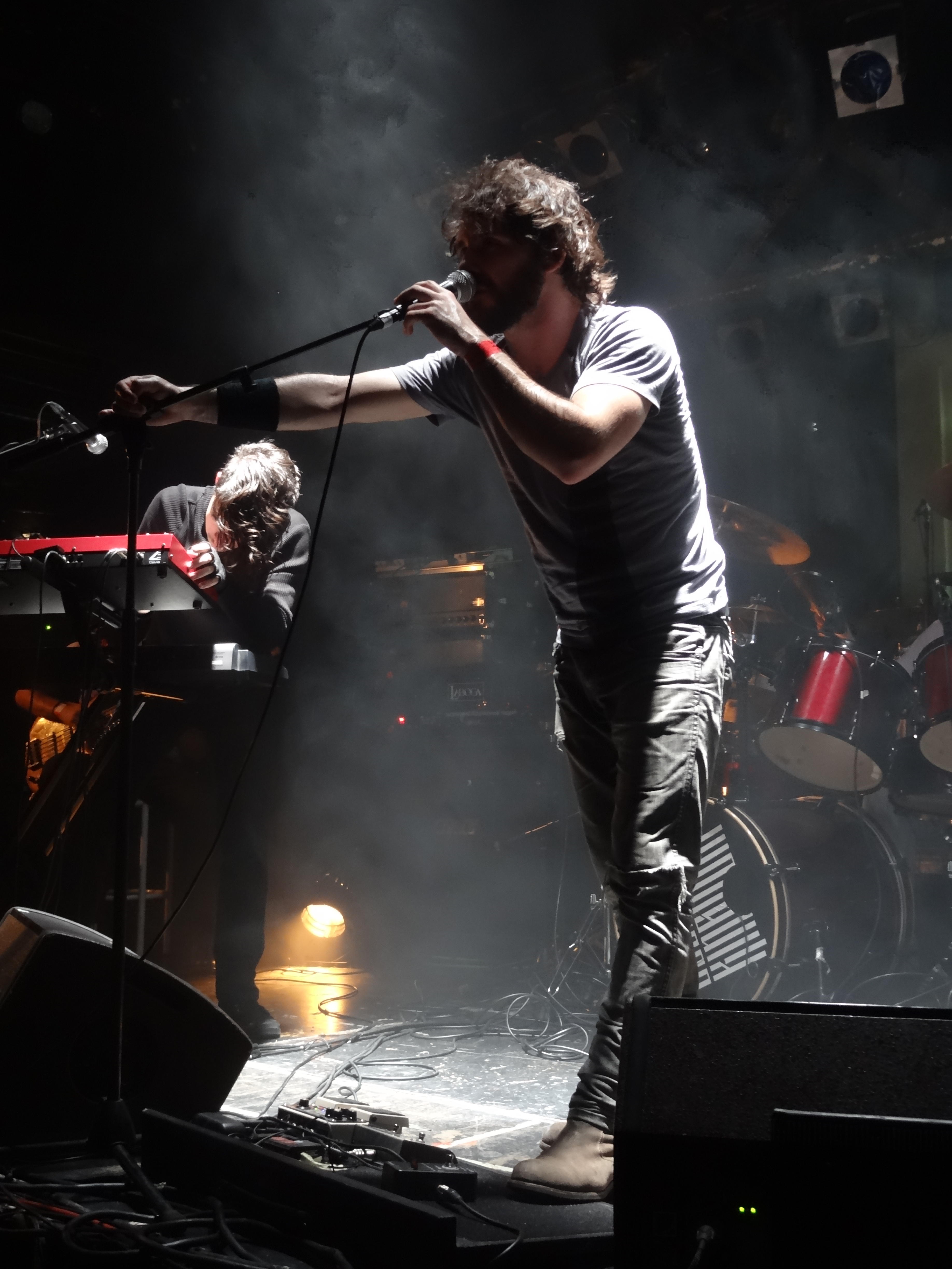 Chanteur d'Obsidian Kingdom lors de leur première partie du concert de Cult of Luna, à la salle Razzmatazz 3, Barcelone